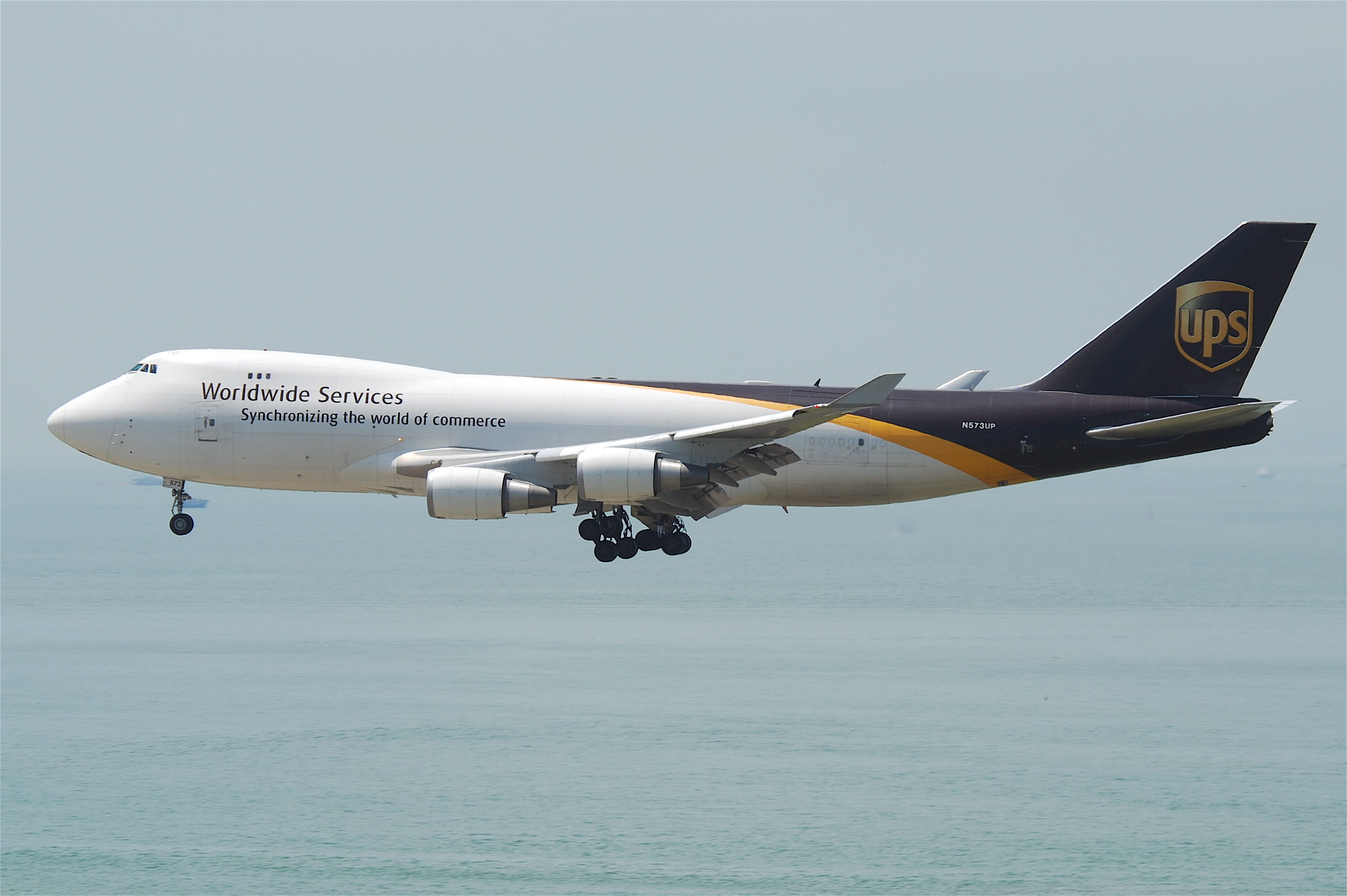 UPS Boeing 747-400F; N573UP@HKG;31.07.2011/614mm